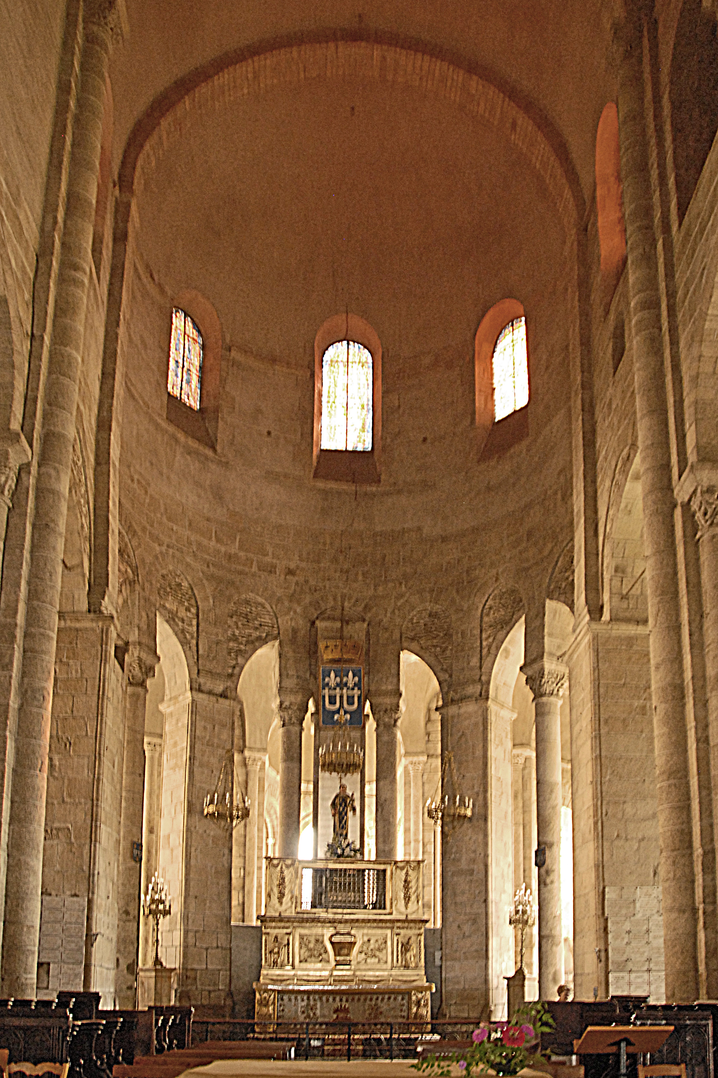 Stiftskirche St.-Léonard-de-Noblat, Chorraum aus Vierung